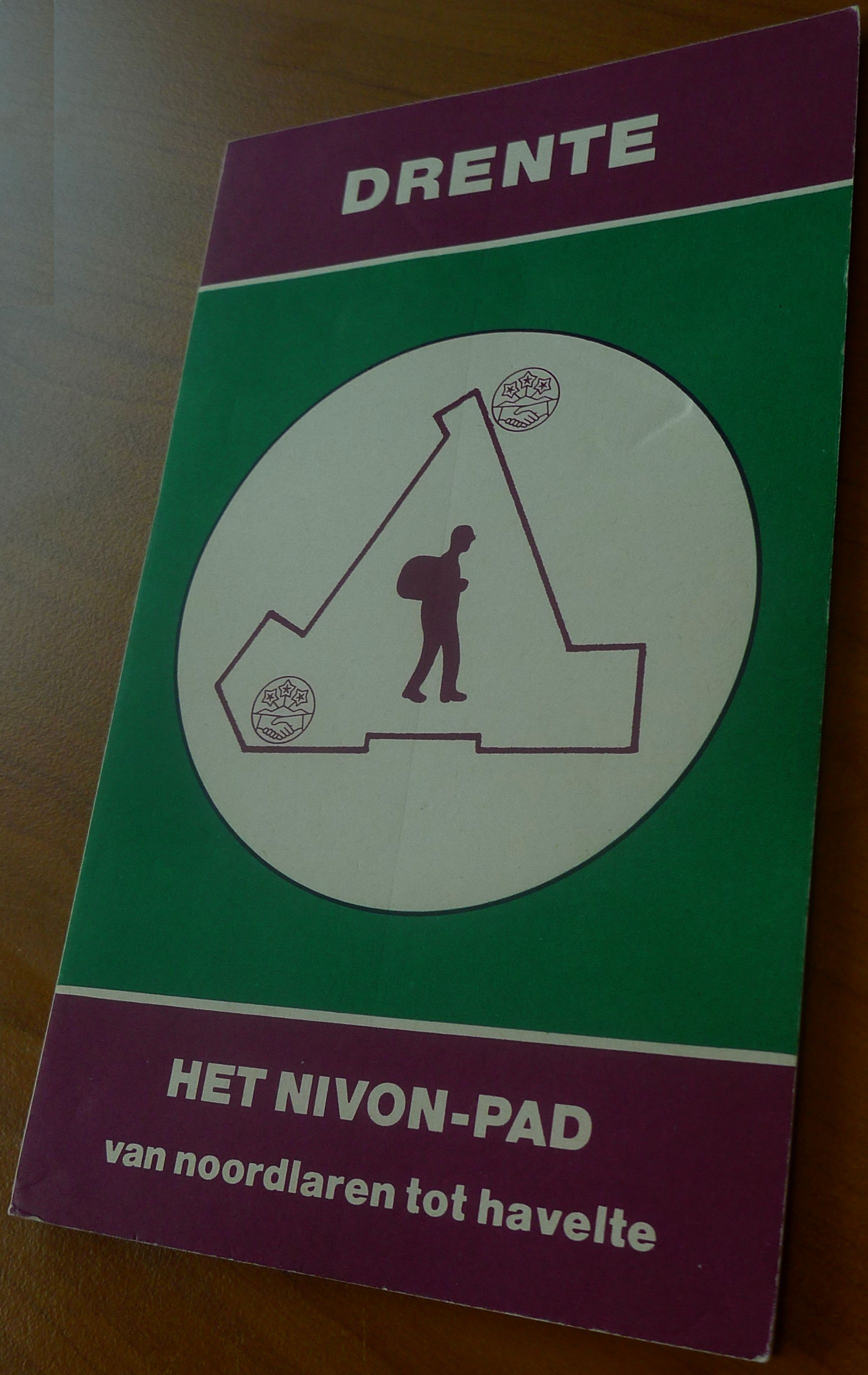 het allereerste Nivon-wandelgidsje 'Het Nivonpad' van Natuurvriendenhuis De Hondsrug in Noordlaren naar Natuurvriendenhuis Het Hunehuis in Darp (Havelte).